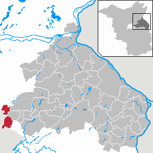 Hoppegarten in Brandenburg (Country) - District Märkisch-Oderland